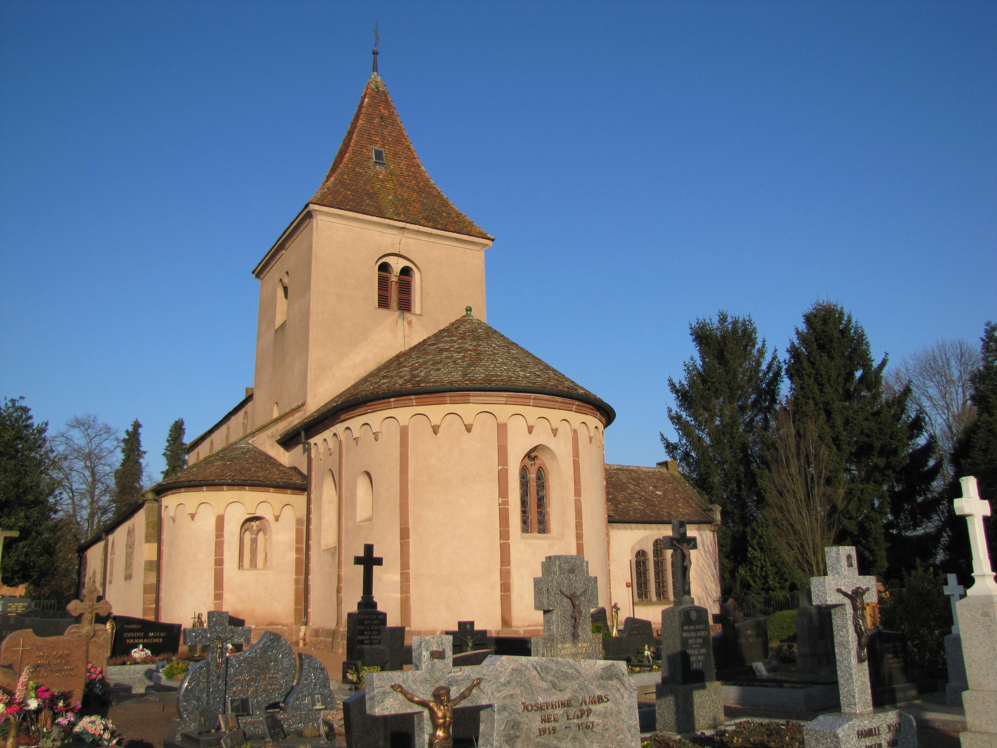 Alsace, Bas-Rhin, Église Saints-Pierre-et-Paul de Hohatzenheim (PA00084751, IA67009140).